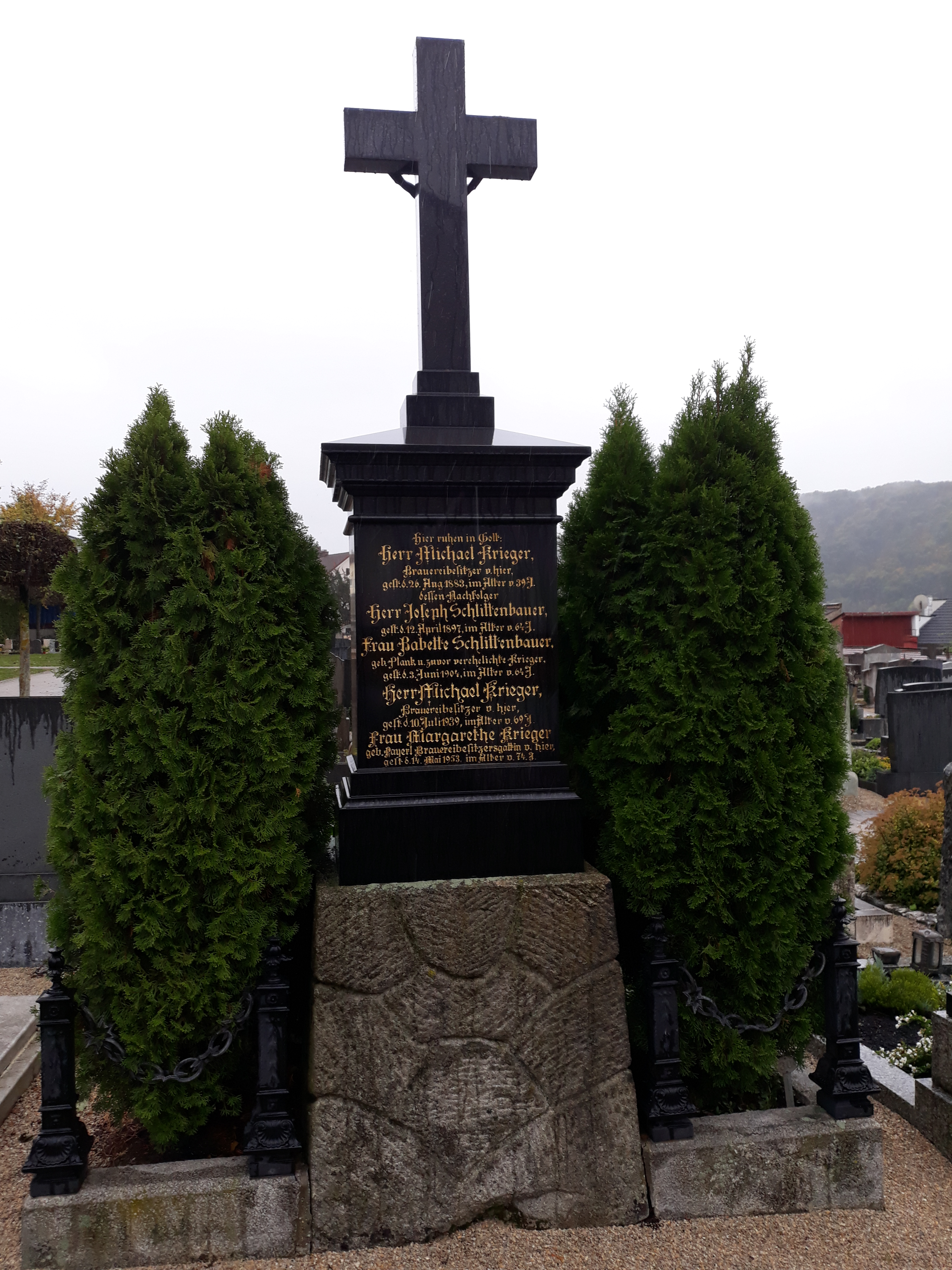 Das Familiengrab der Bierbrauerfamilie Krieger auf dem Friedhof von Riedenburg (Altmühl).